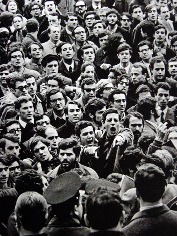 Roma, febbraio 1968, manifestazione di studenti davanti alla facolta' di lettere